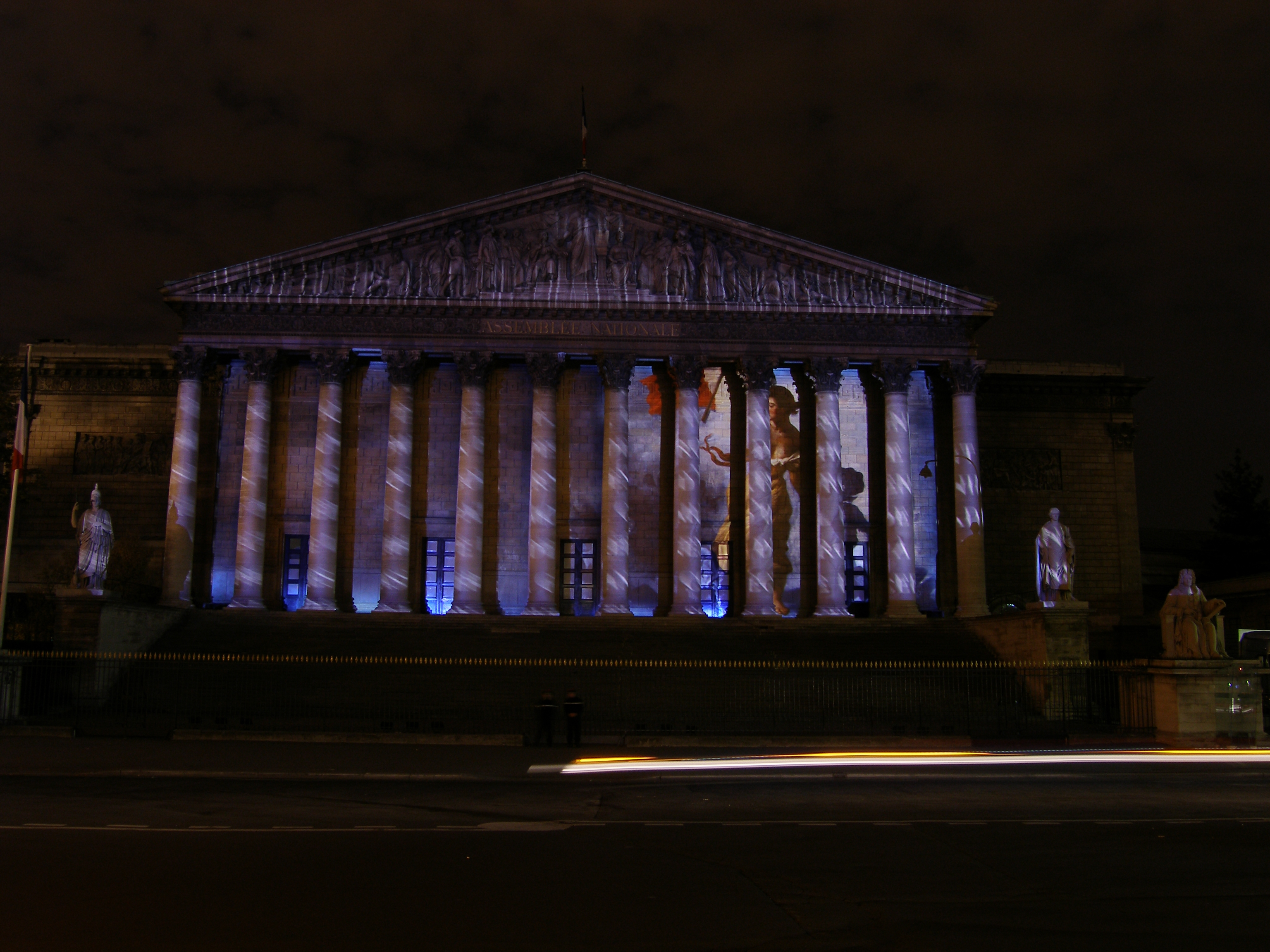 Assemblée nationale - Illumination `La liberté guidant les peuples`